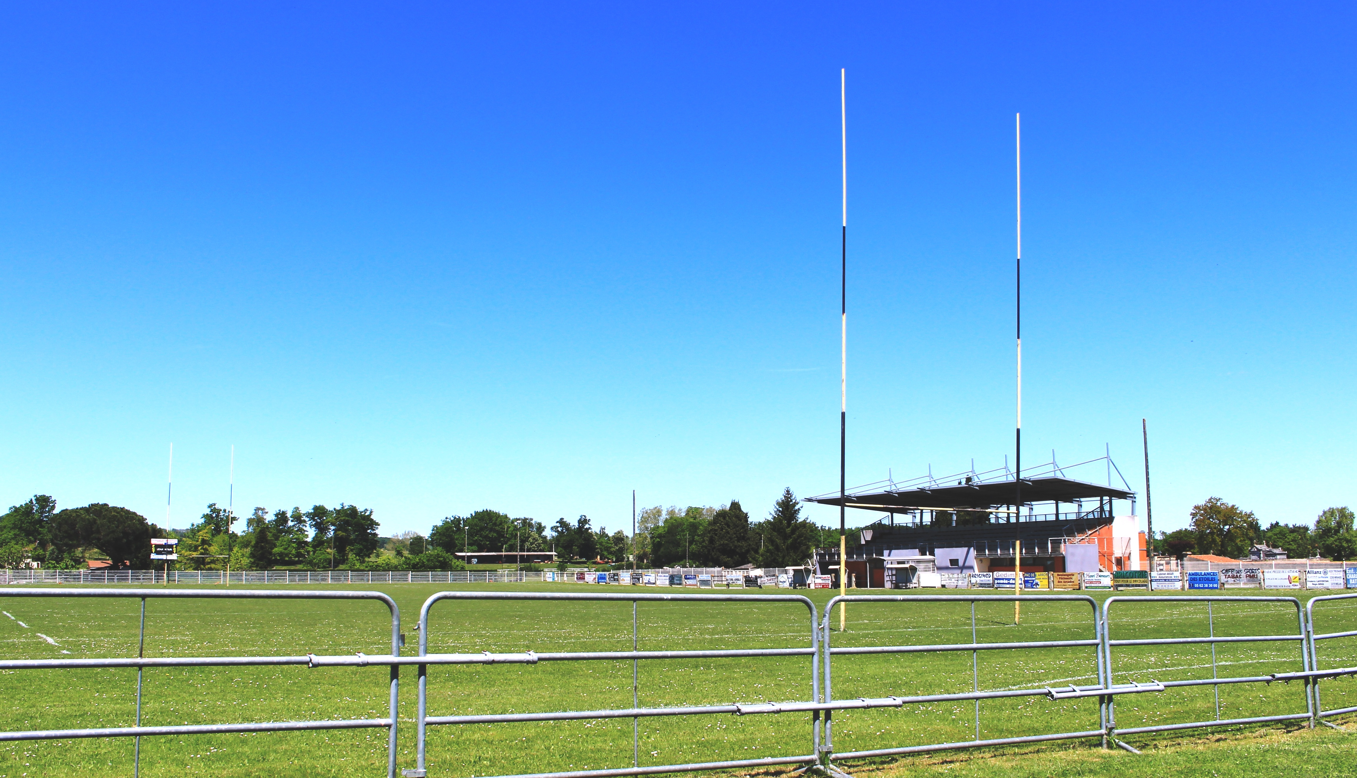 Stade de rugby de Trie-sur-Baïse (Hautes-Pyrénées)